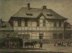 Elisabethstift, Neinstedter Anstalten